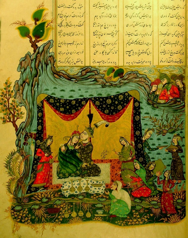 Маниже принимает Бижана на лугу. Шахнаме. 1644г